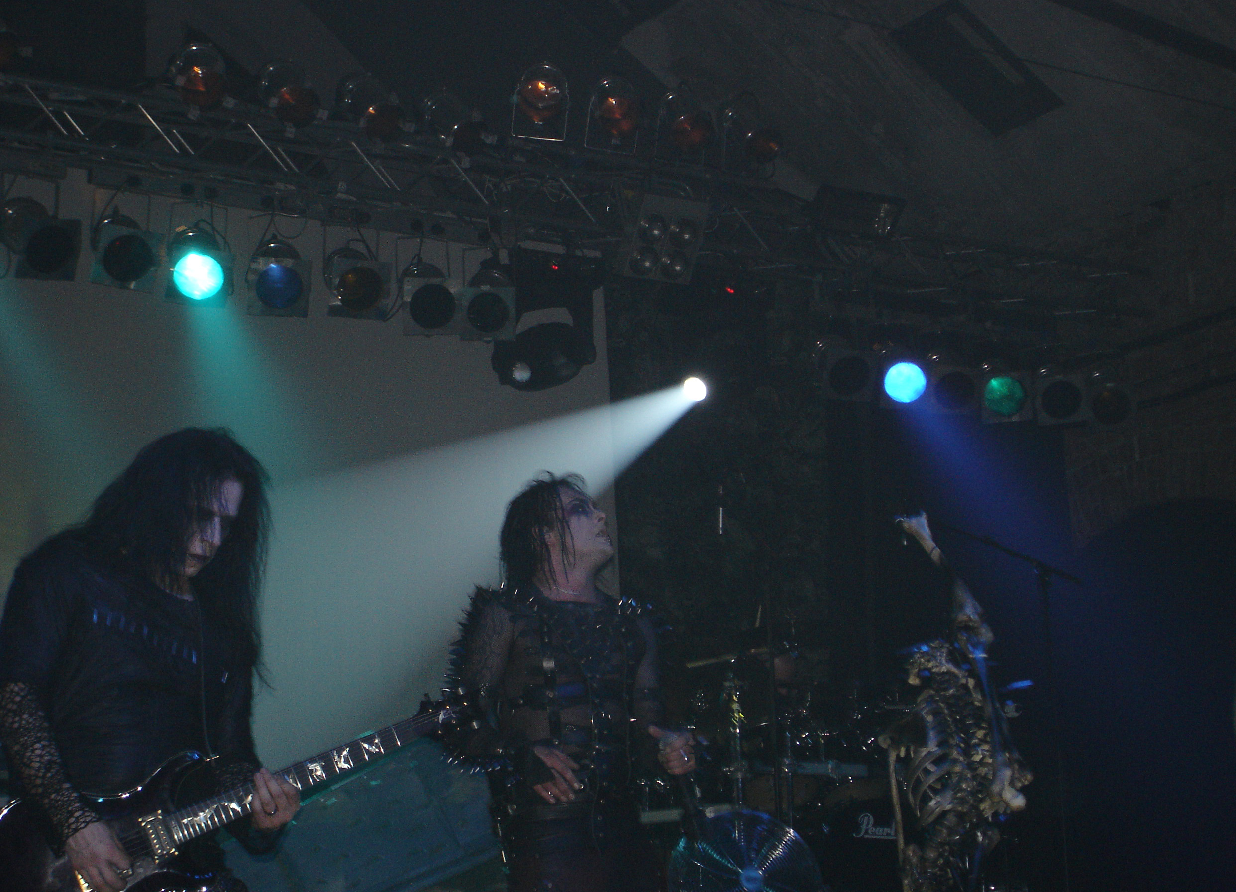 Cradle of Filth zum "Filth Fest" in der Dresdner Reithalle